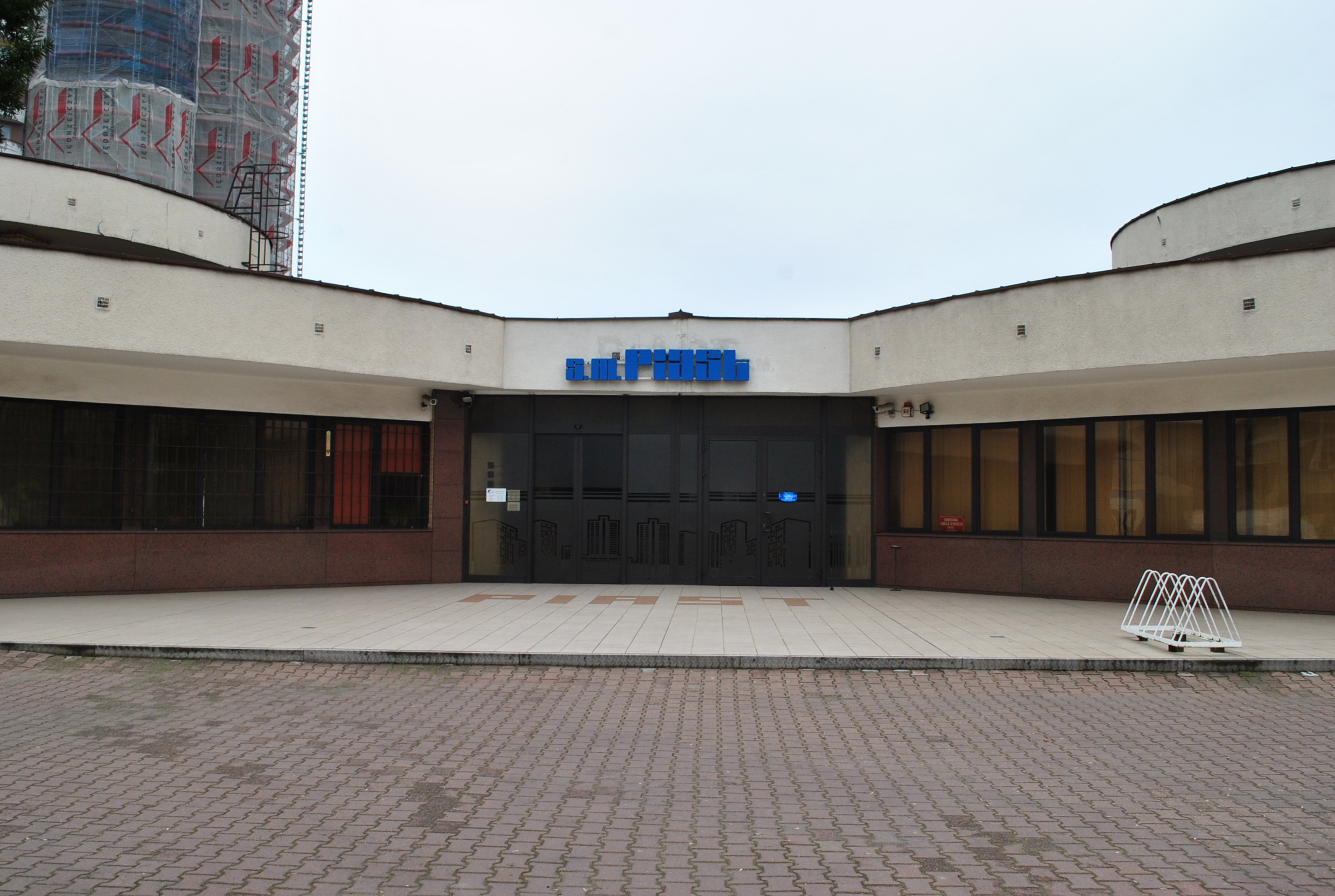 Katowice, Osiedle Tysiąclecia. Siedziba Spółdzielni Mieszkaniowej Piast